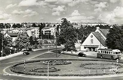 Alviksplan (Drottningholmsvägen) mot sydost med Bromma-Teatern